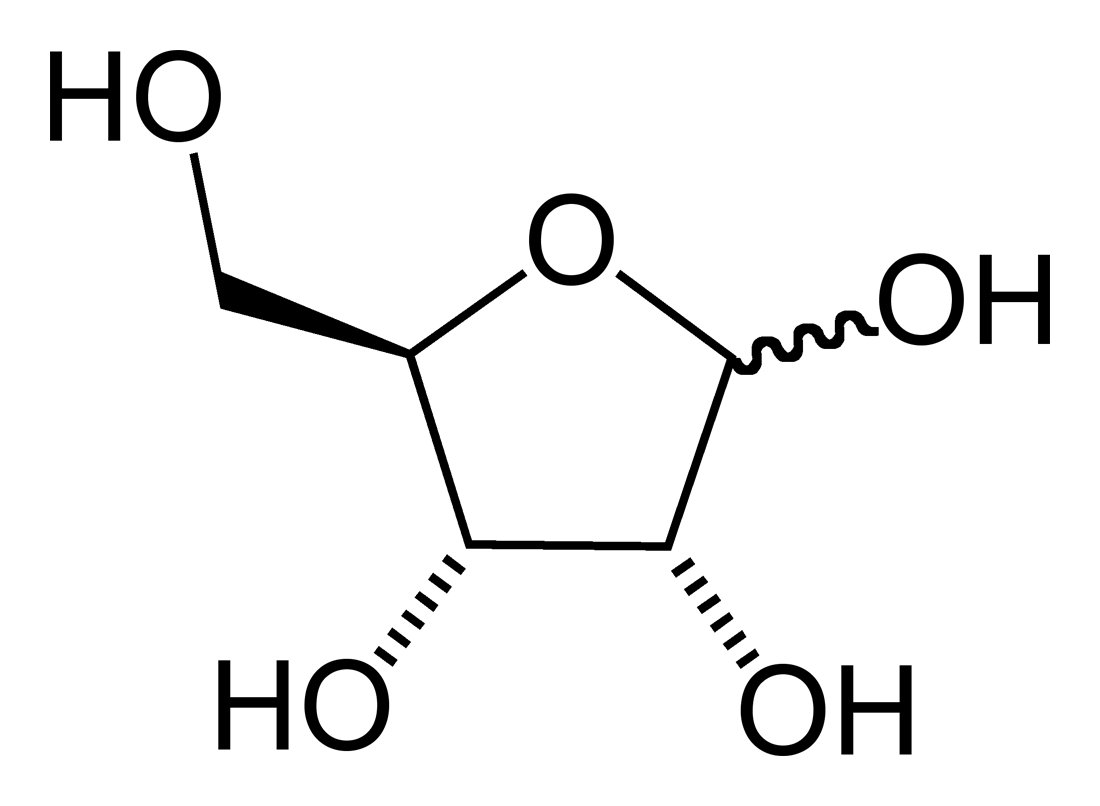 Ribofuranose